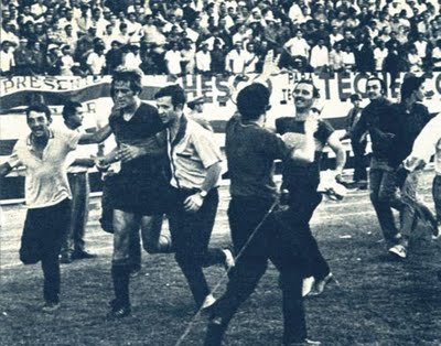 Vuelta olímpica en el estadio de River de los futbolistas de Boca Juniors, luego de ganar el Torneo Nacional de 1969.